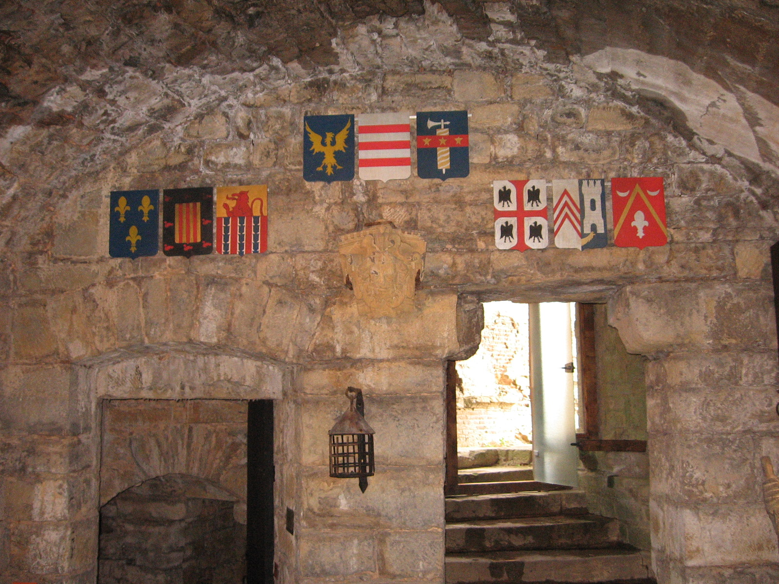 Blasons dans la salle d'armes du Château de Montcornet (08).